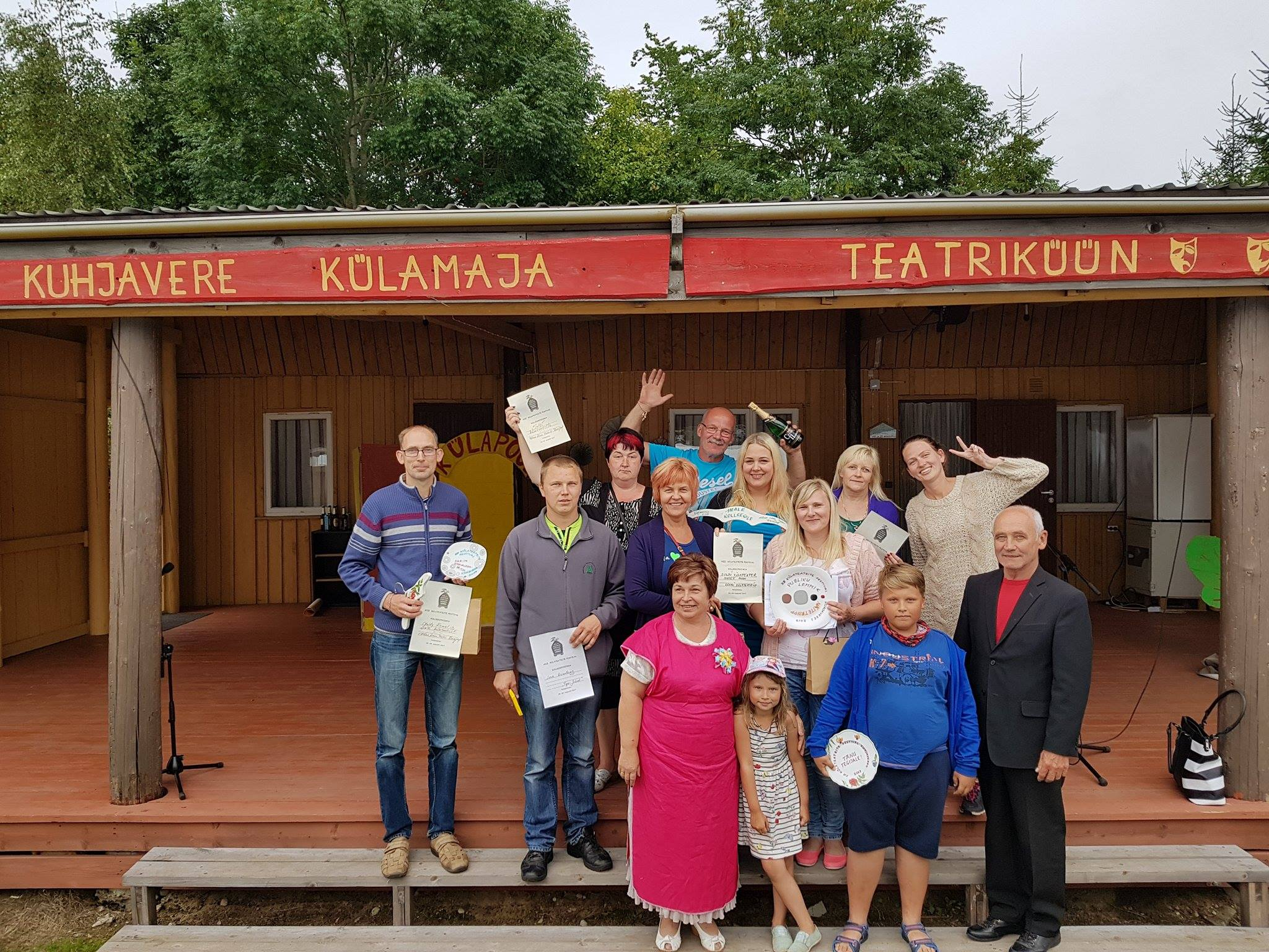 Sulbi külateater tuli 2017. aastal Kuhjavere teatripäevade laureaadiks etendusega "Kae kos pandse plõnni!". Fotol külateatri liikmed koos Kuhjavere teatripäevade peakorraldajatega